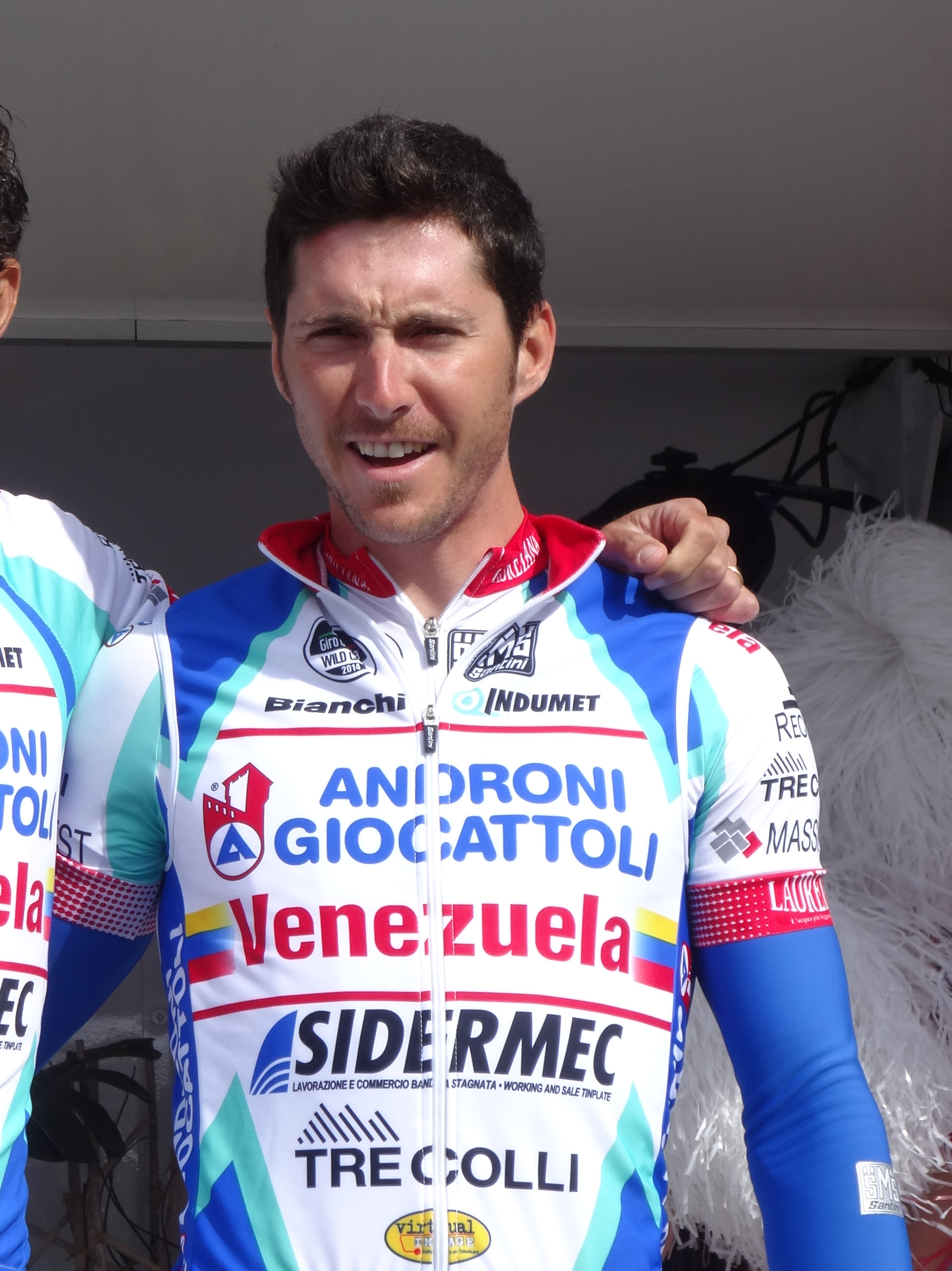 Reportage réalisé le jeudi 17 avril à l'occasion du départ et de l'arrivée du Grand Prix de Denain 2014 à Denain, Nord, Nord-Pas-de-Calais, France.